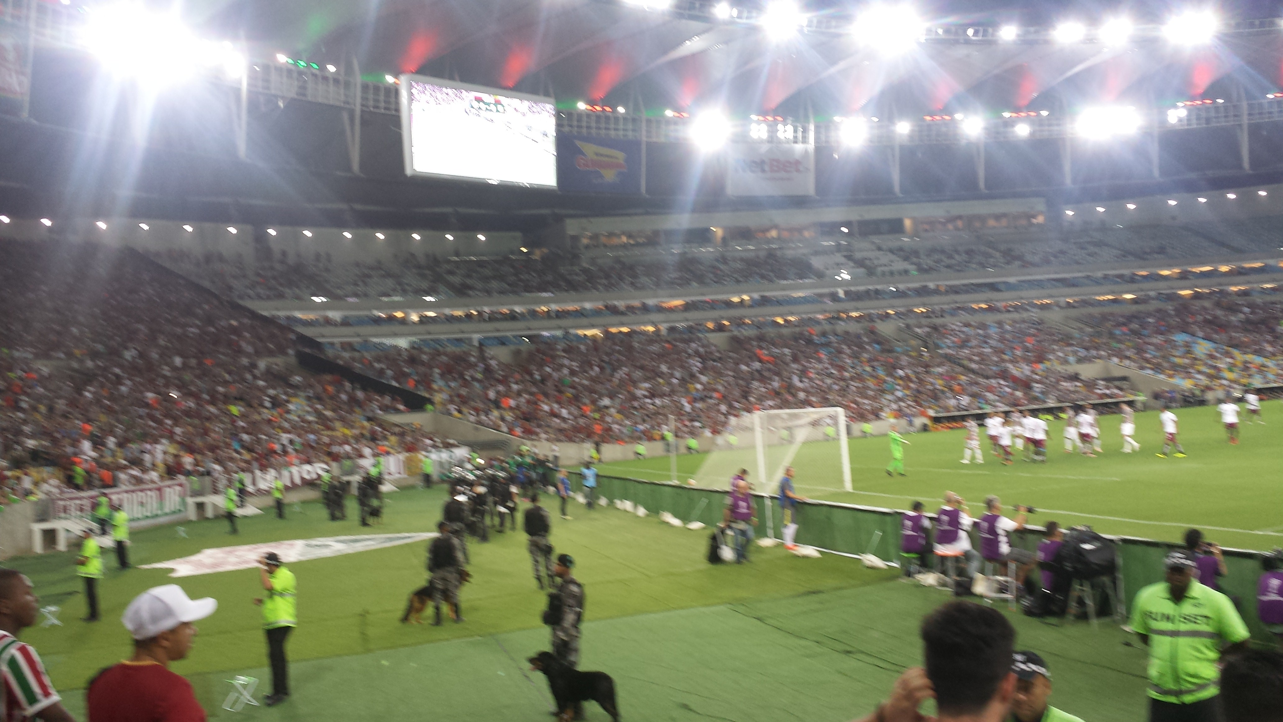 Fluminense 2 a 0 Deportivo Cuenca Quinta Feira - 04-10-2018 (19:30) Copa Sul-Americana de 2018 com 39.157 torcedores presentes (36.902 pagantes).